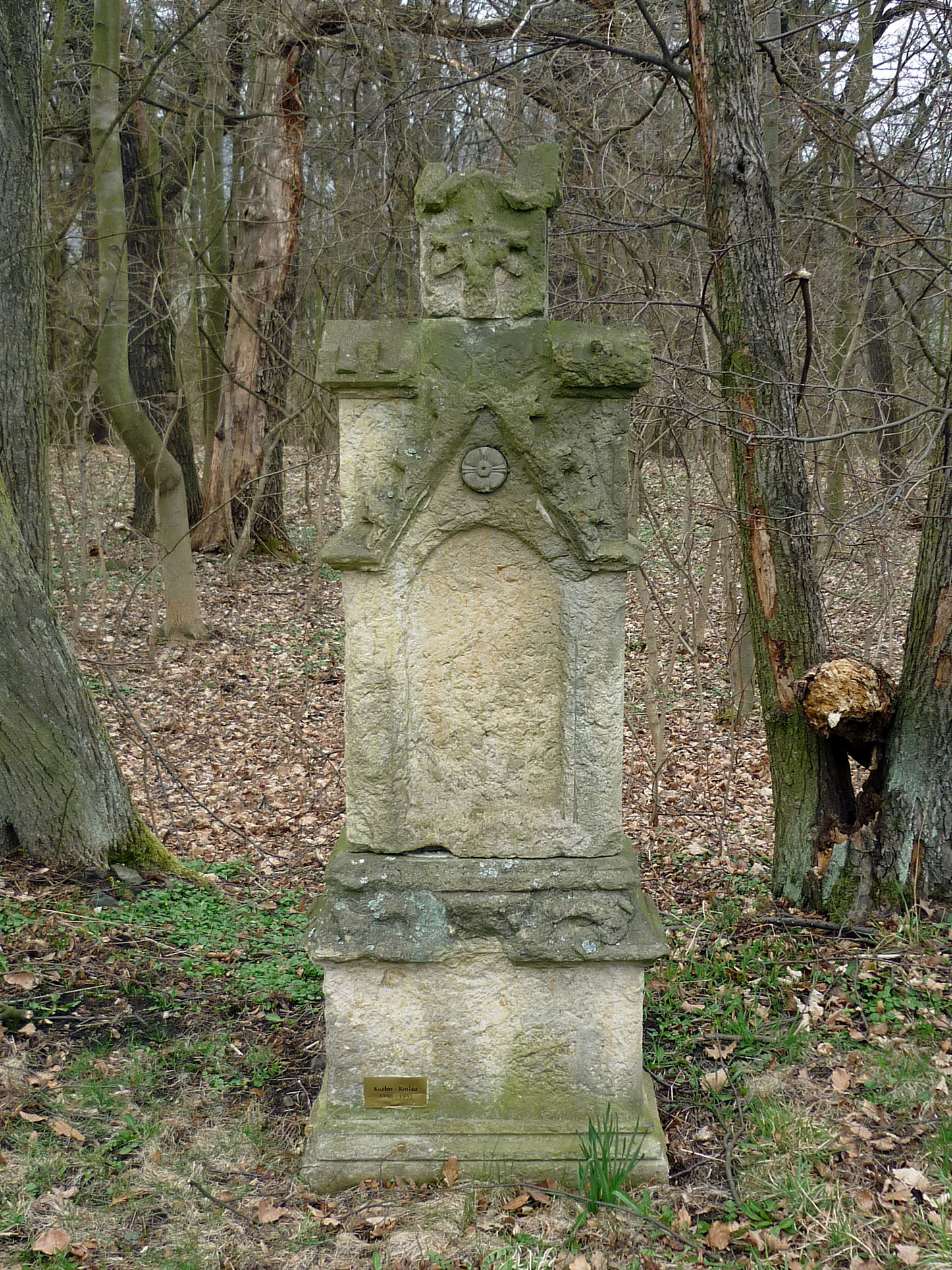 Lapidarium der zerstörten Orte im Duppauer Gebirge auf dem Winteritzer Kapellenberg: Bildstock aus Kozlov – Koslau (1398-1953)